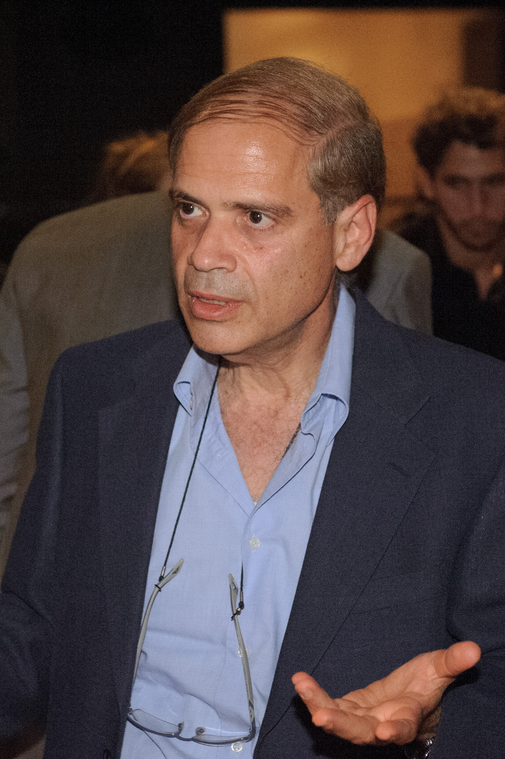 Yaakov Hadas-Handelsman (israelischer Botschafter in Deutschland) Die deutsch-israelischen Literaturtage - organisiert vom Goethe-Institut und der Heinrich-Böll-Stiftung - finden seit sechs Jahren abwechselnd in Berlin und in Tel Aviv statt. Neben Lesungen und Diskussionen gibt es im April auch Filme zu sehen. Abgeschlossen wird *beziehungsweise(n)* durch eine Diskussionsrunde, in der Aktivist/innen, Journalist/innen und Autor/innen über den Begriff der Solidarität, über gesellschaftliche Vorstellungen des Zusammenhalts und der sozialen Gerechtigkeit debattieren. Foto: Stephan Roehl